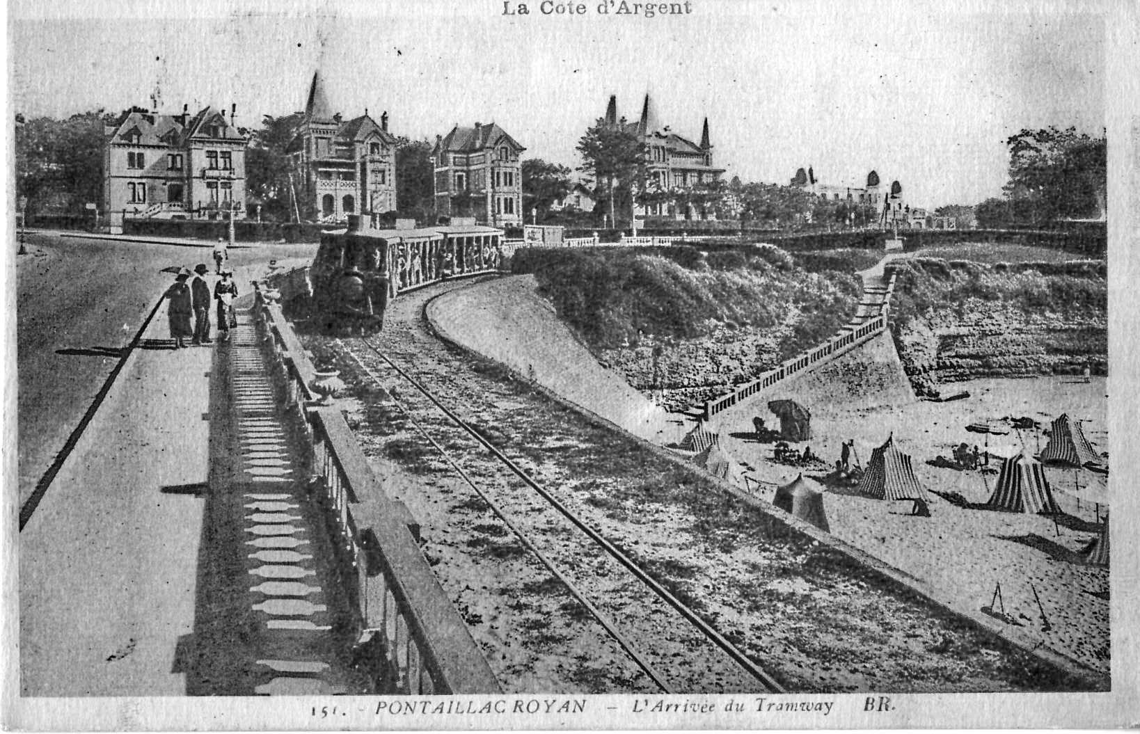 Carte postale ancienne éditée par BR n° 151 (Bloc Frères éditeurs à Bordeaux) : PONTAILLAC - ROYAN : L'arrivée du Tramway (Tramway de Royan)